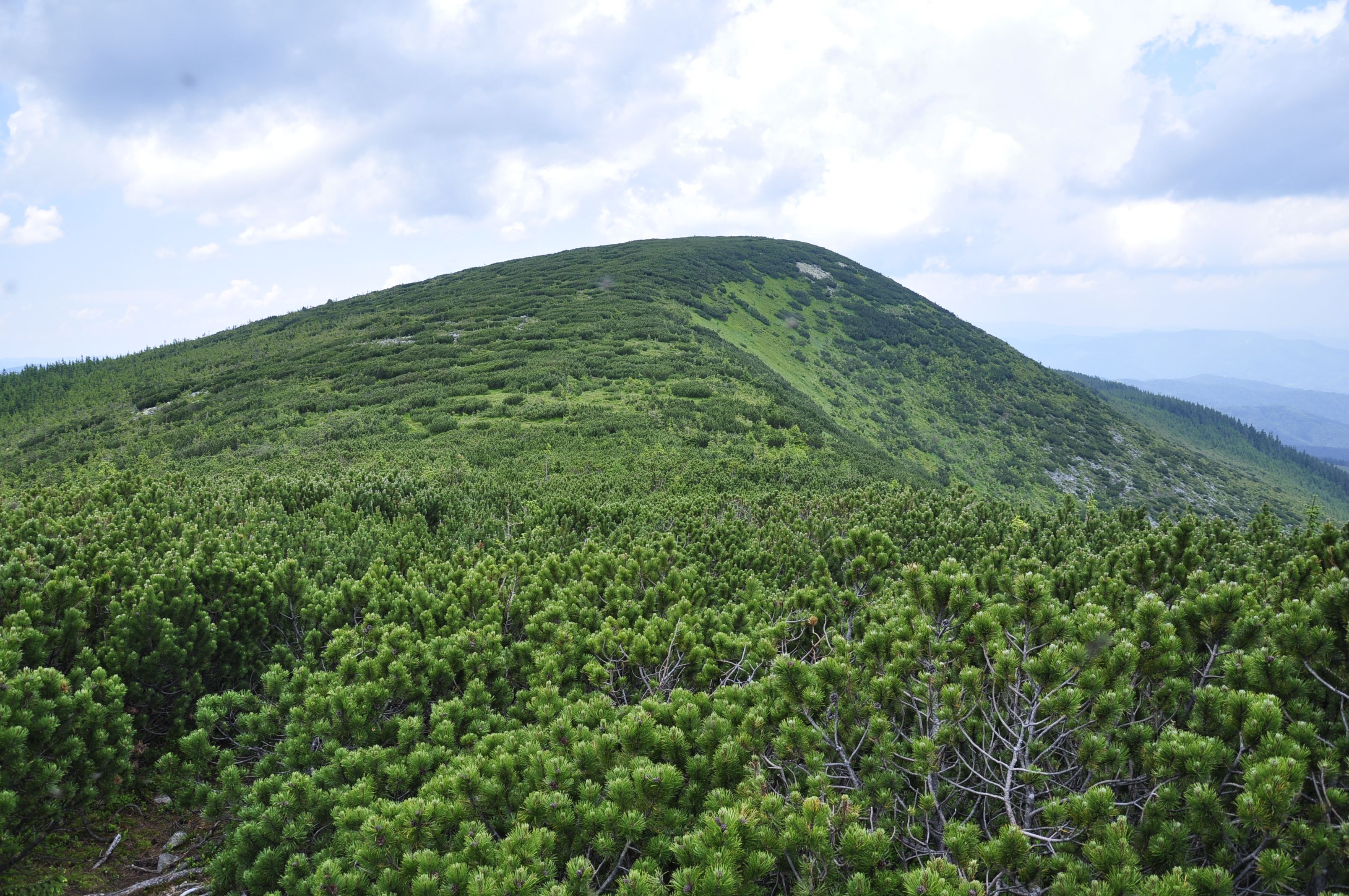 Стрімкіший північний схил хребта входить у заказник